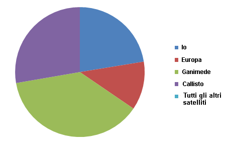 Grafico a torta che mostra le masse percentuali dei satelliti di Giove